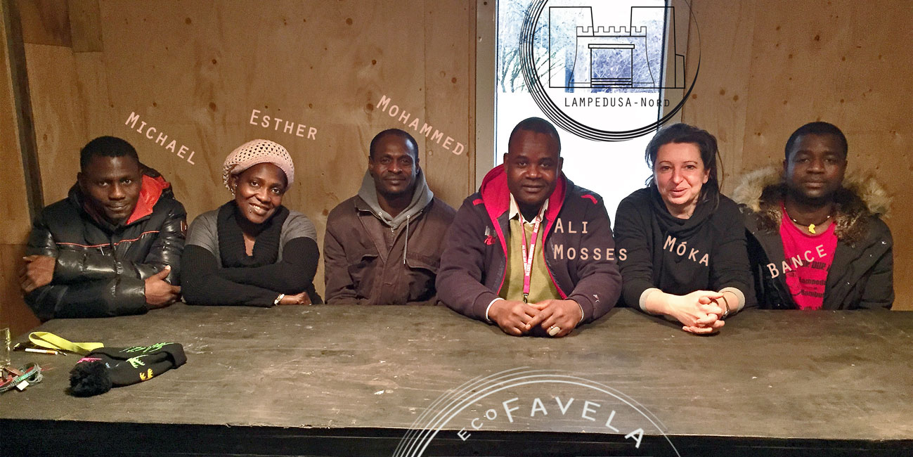 Die ecoFAVELA beherbergte im Winter 2014/2015 in einem energiereffizient ausgebauten Haus 6 Geflohene aus Afrika. Das Projekt gewährte ihnen Kunstasyl und verlieh den Geflohenen allgemeine Menschenrechte, wie beispielsweise Recht auf Arbeit etc..